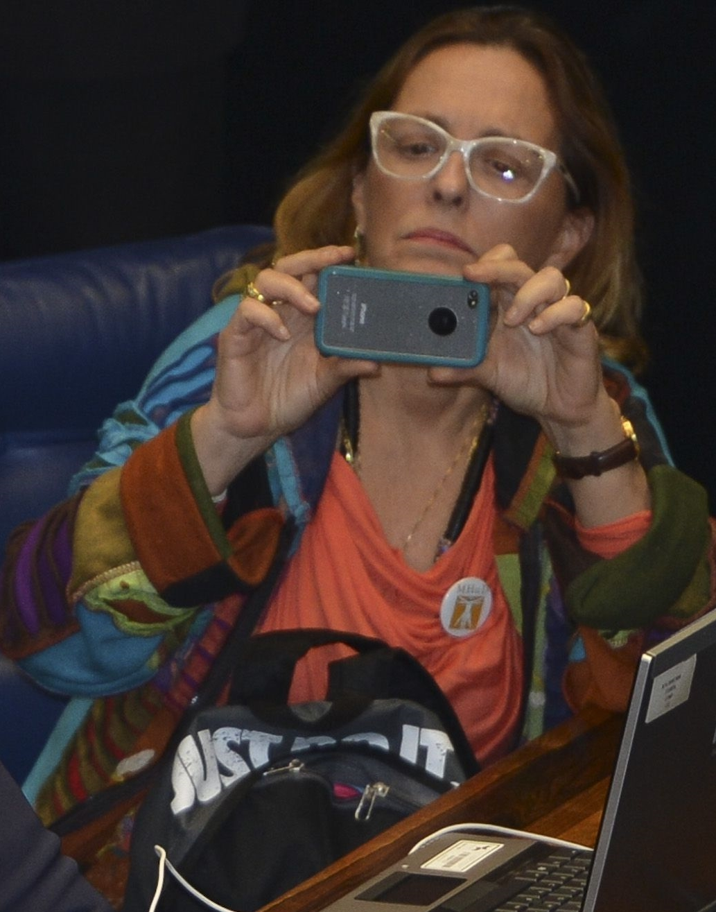 A atriz brasileira Maria Zilda Bethlem, no Congresso Naciional, durante a votação da emenda constitucional de repressão ao trabalho escravo.